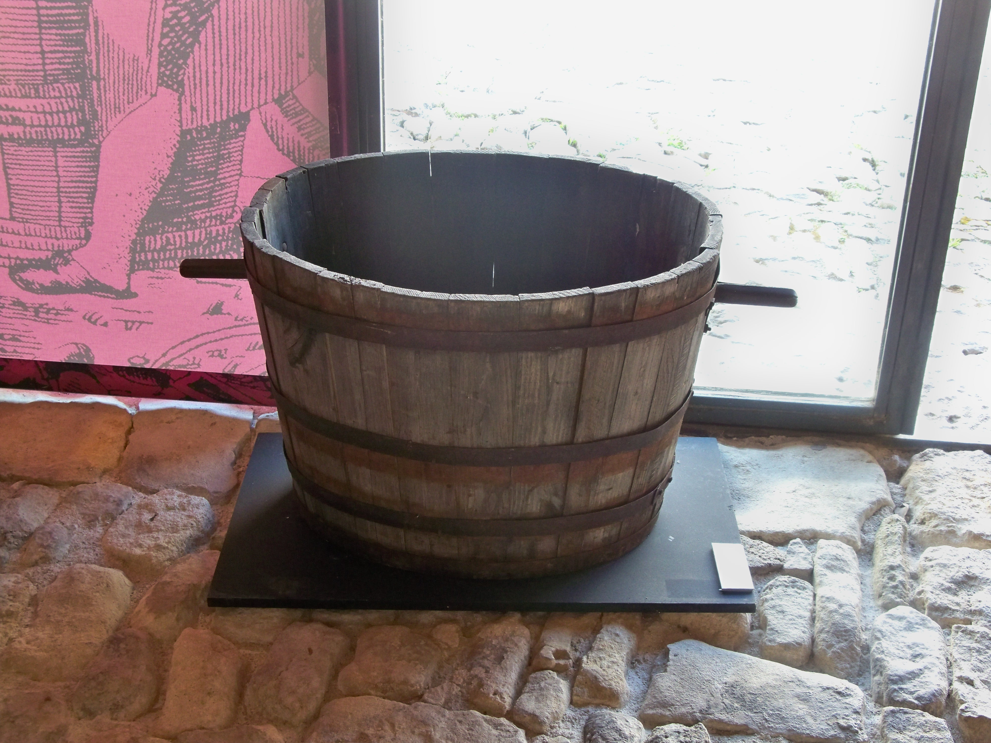 Prieuré de Salagon à Mane (04) This building is en partie classé, en partie inscrit au titre des Monuments Historiques. .